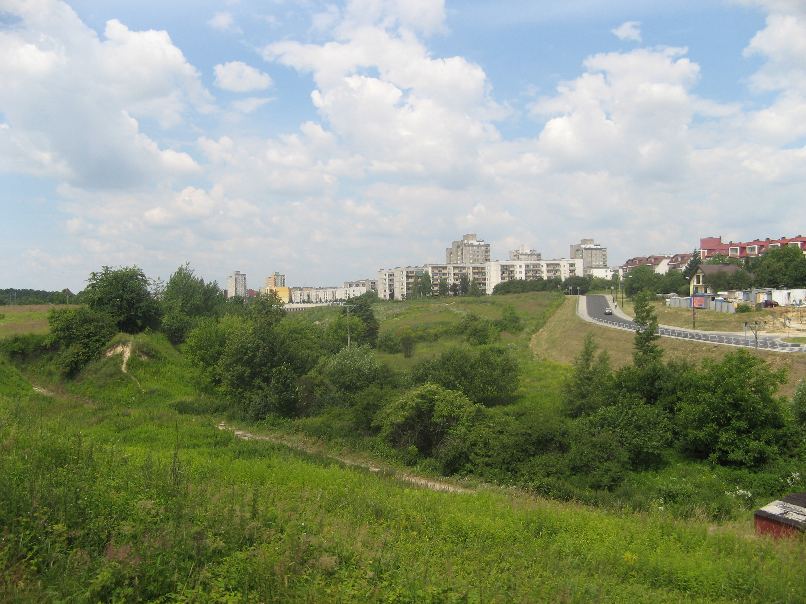 Lublin - osiedle Górki.